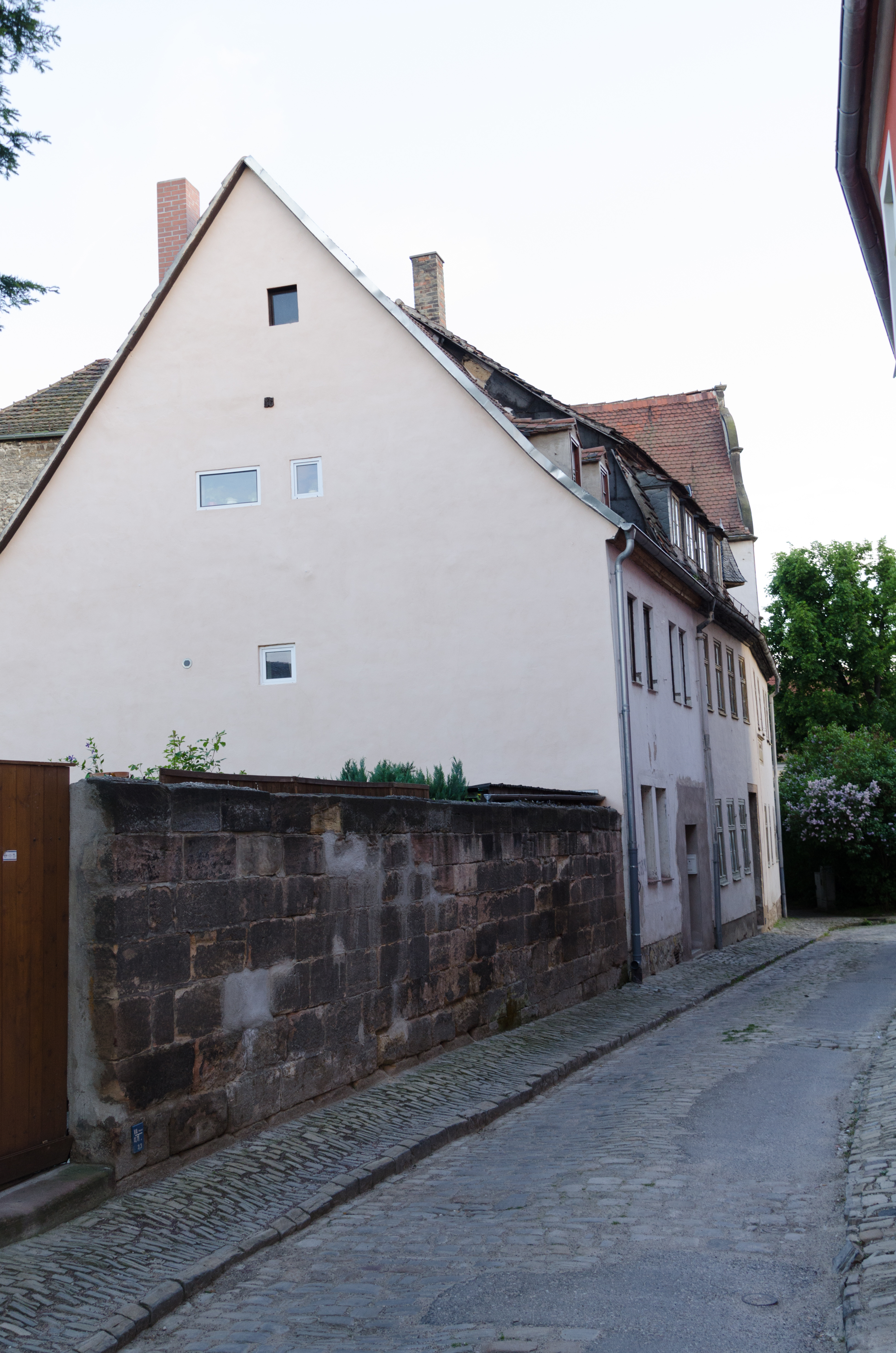 Naumburg, Neuer Steinweg 2, 1